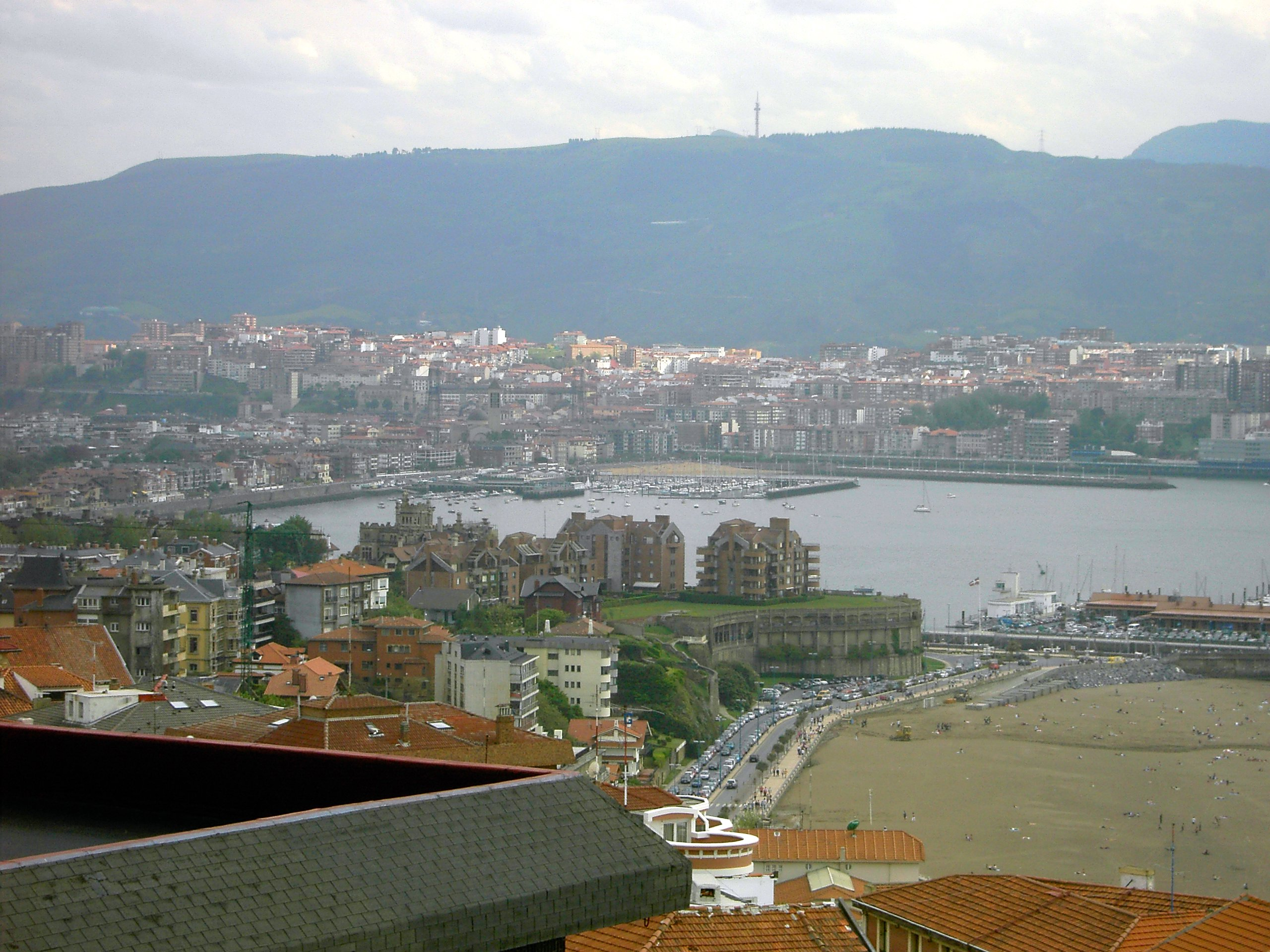 Vista de Ereaga, Neguri, Las Arenas y de fondo Portugalete